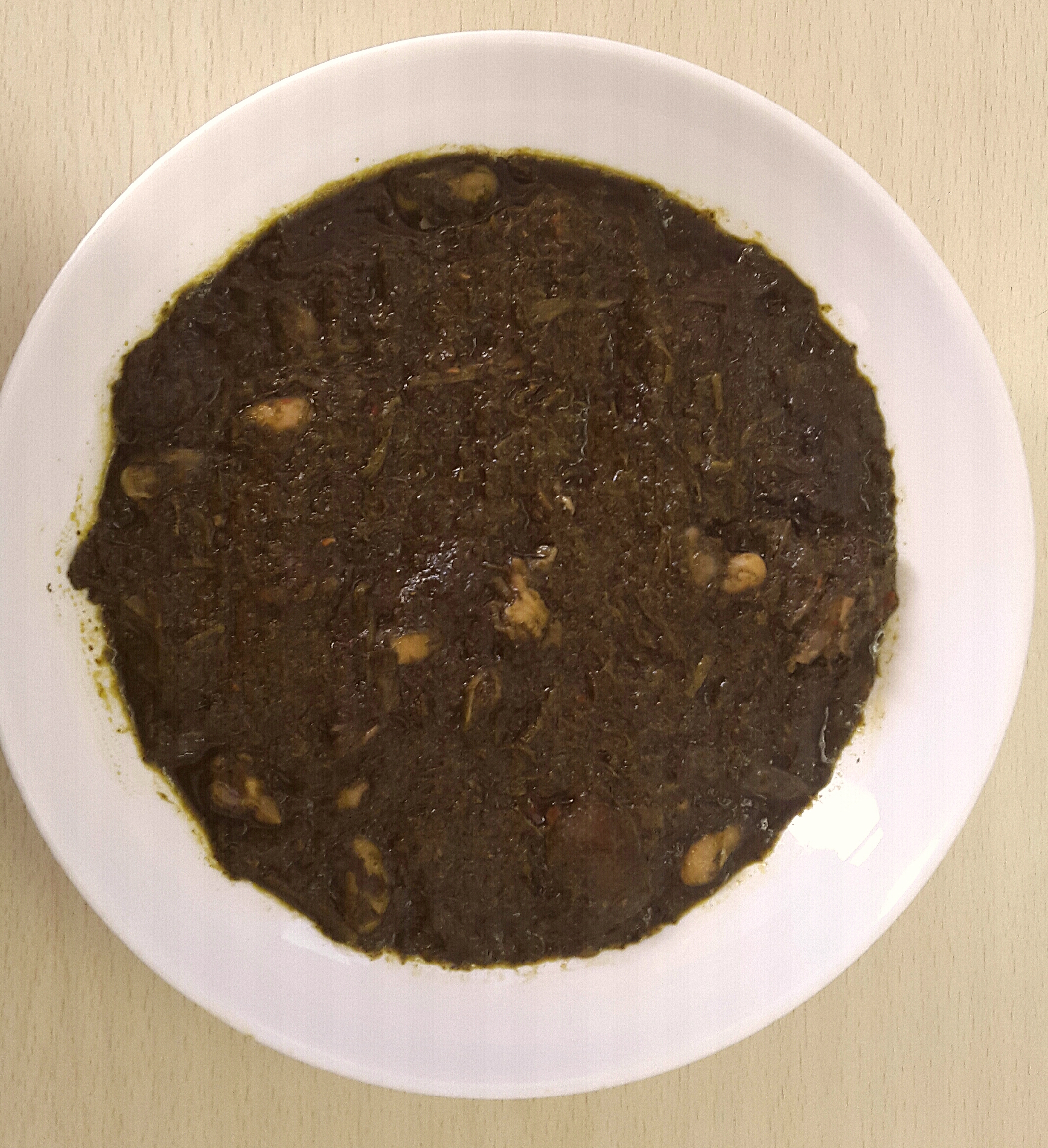 مدفونة This is an image of food from Tunisia